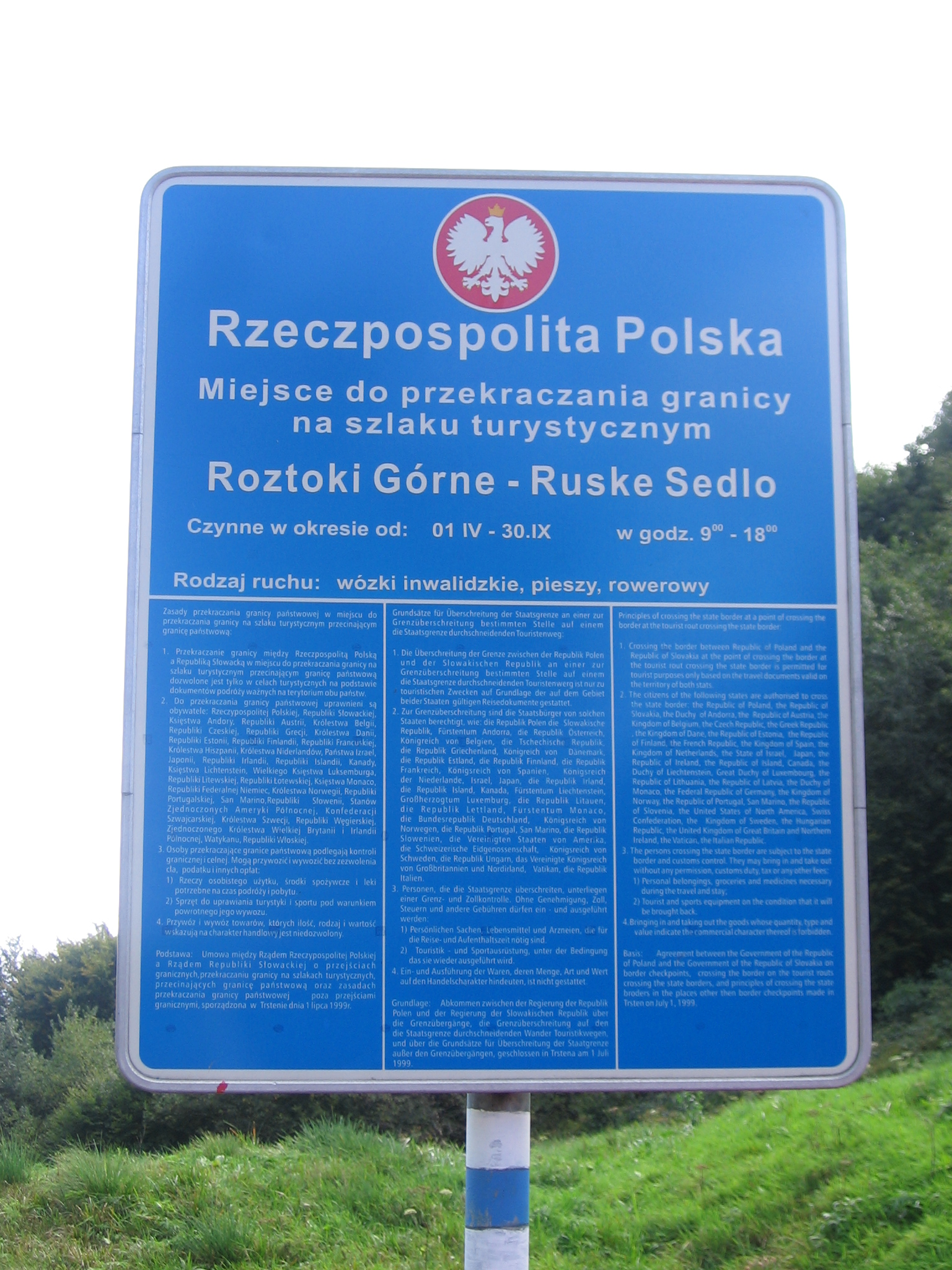 Nad Roztokami pass in Bieszczady mountains - Polish official table Przełęcz nad Roztokami Górnymi - polska tablica urzędowa